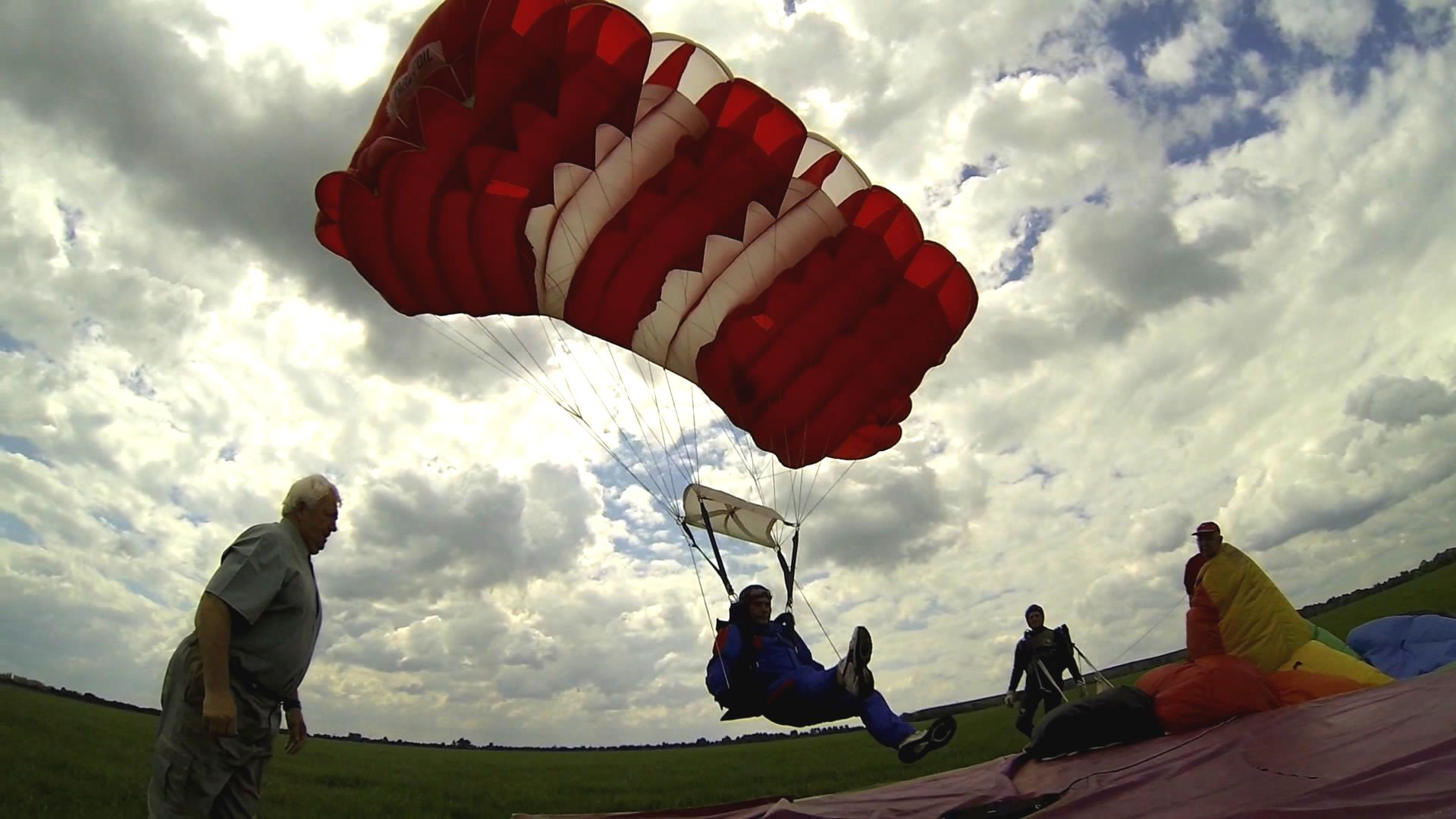 Spadochronowe Mistrzostwa Śląska 2014 - konkurencja spadochrony szybkie. Ląduje Jan Isielenis — Sekcja Spadochronowa Aeroklubu Gliwickiego